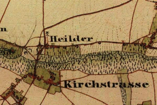 Preußische Kartenaufnahme 1846 - Uraufnahme